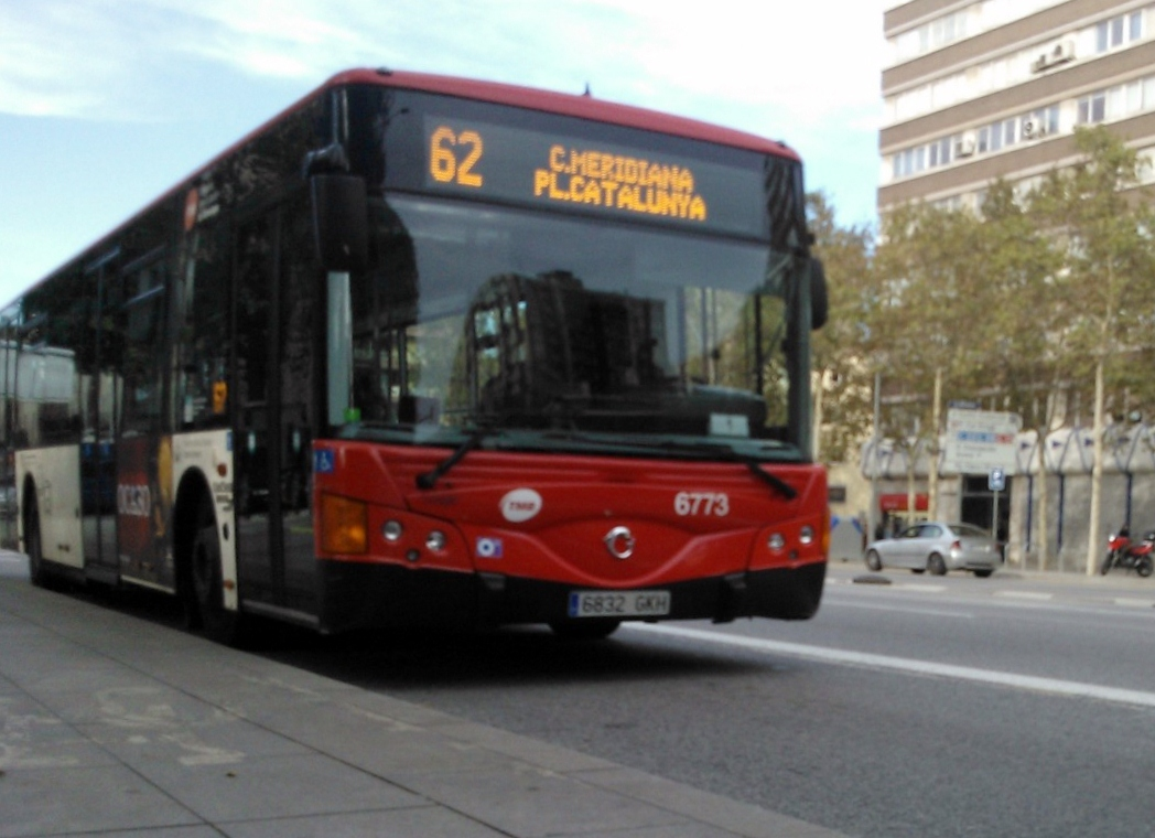 Autobús interurbà/urba a Barcelona